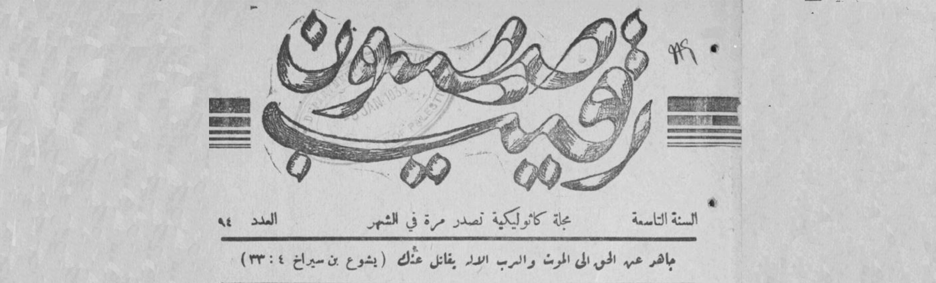 جريدة دينية مسيحية عنت بالمستجدات السياسية وعلى الواقع في العالم العربي